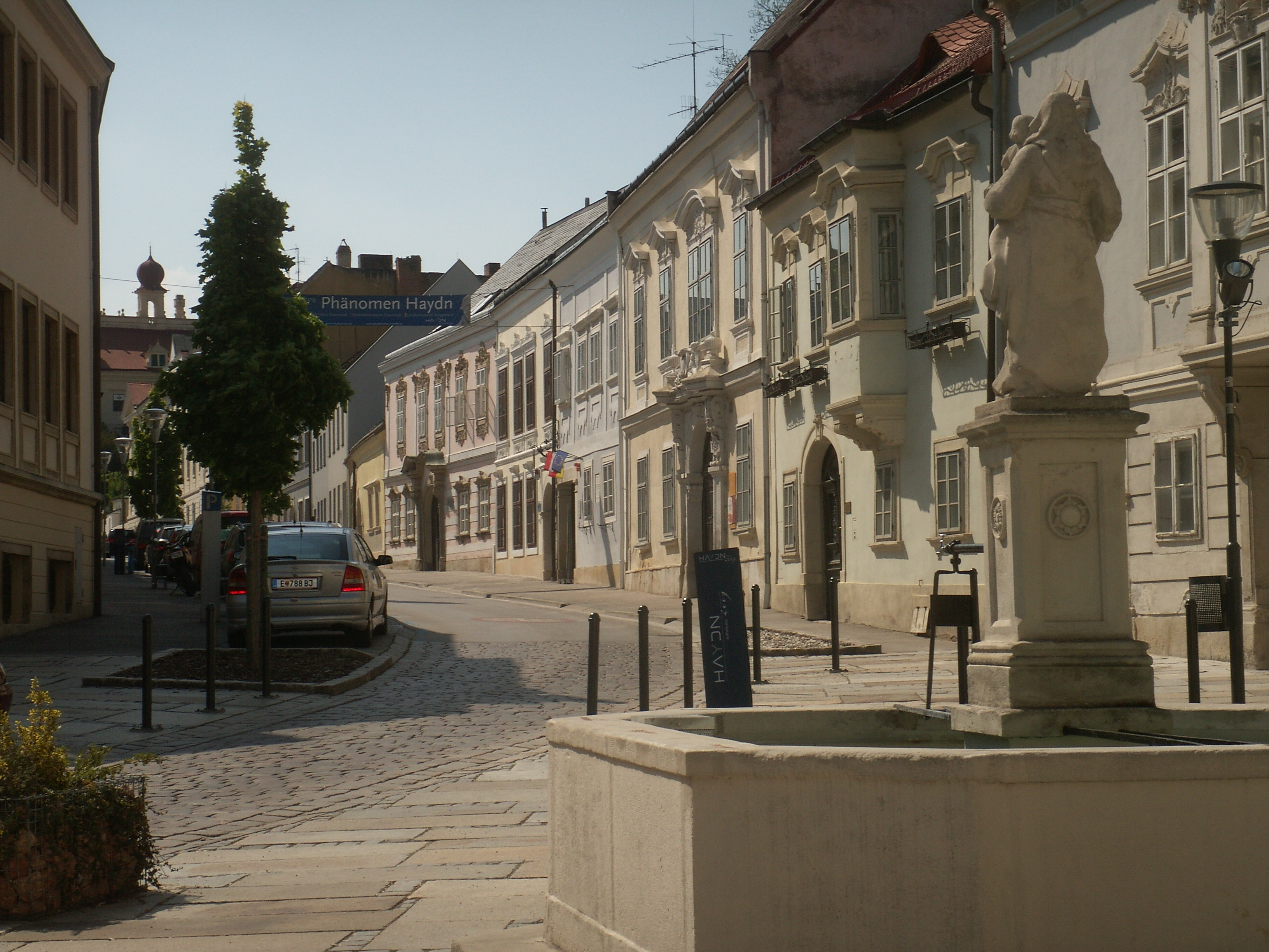 Eisenstadt, Haydngasse, Haydnhaus (Nr. 21)